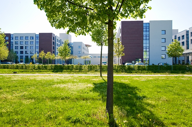 Die Somatischen KLiniken des Park-Krankenhauses Leipzig in der Strümpellstraße.